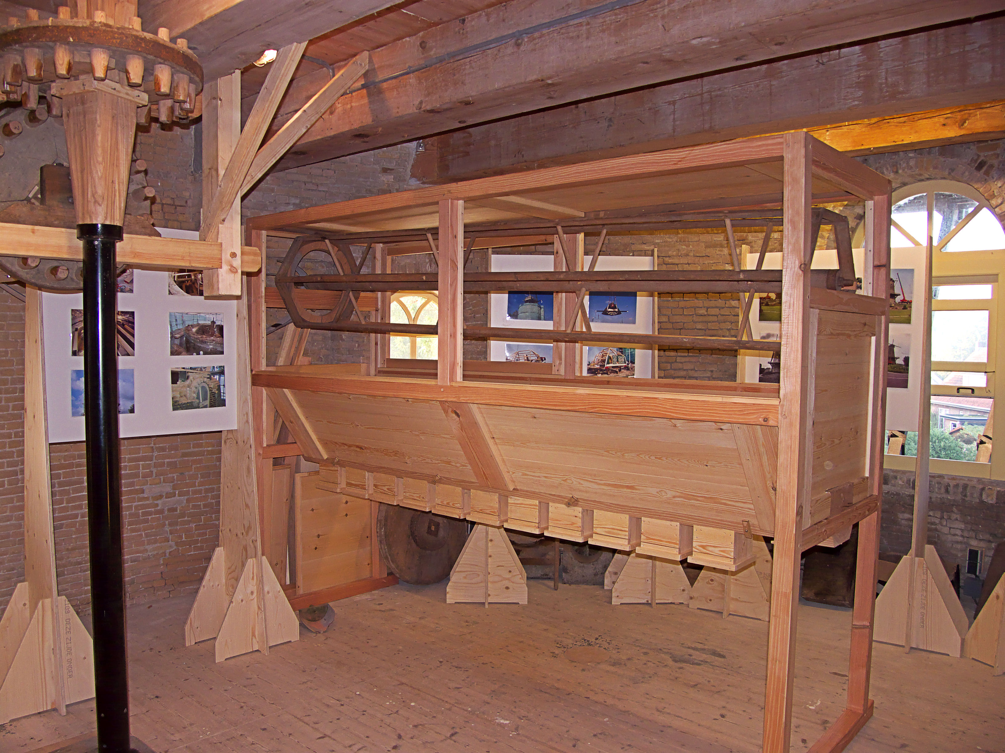 Molen De Korenbloem, Kortgene, buil nog zonder zeefdoek. 13e uitloop moet er nog aangezet worden.